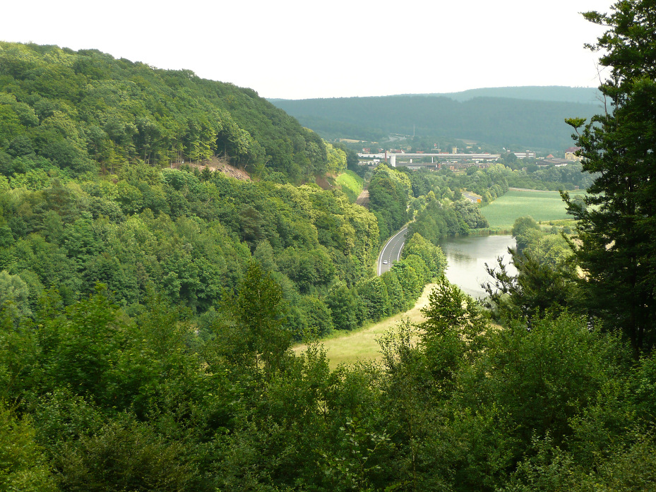 Hedemünden mit B 80, Werra, links im Wald nahe Abhang Römerlager